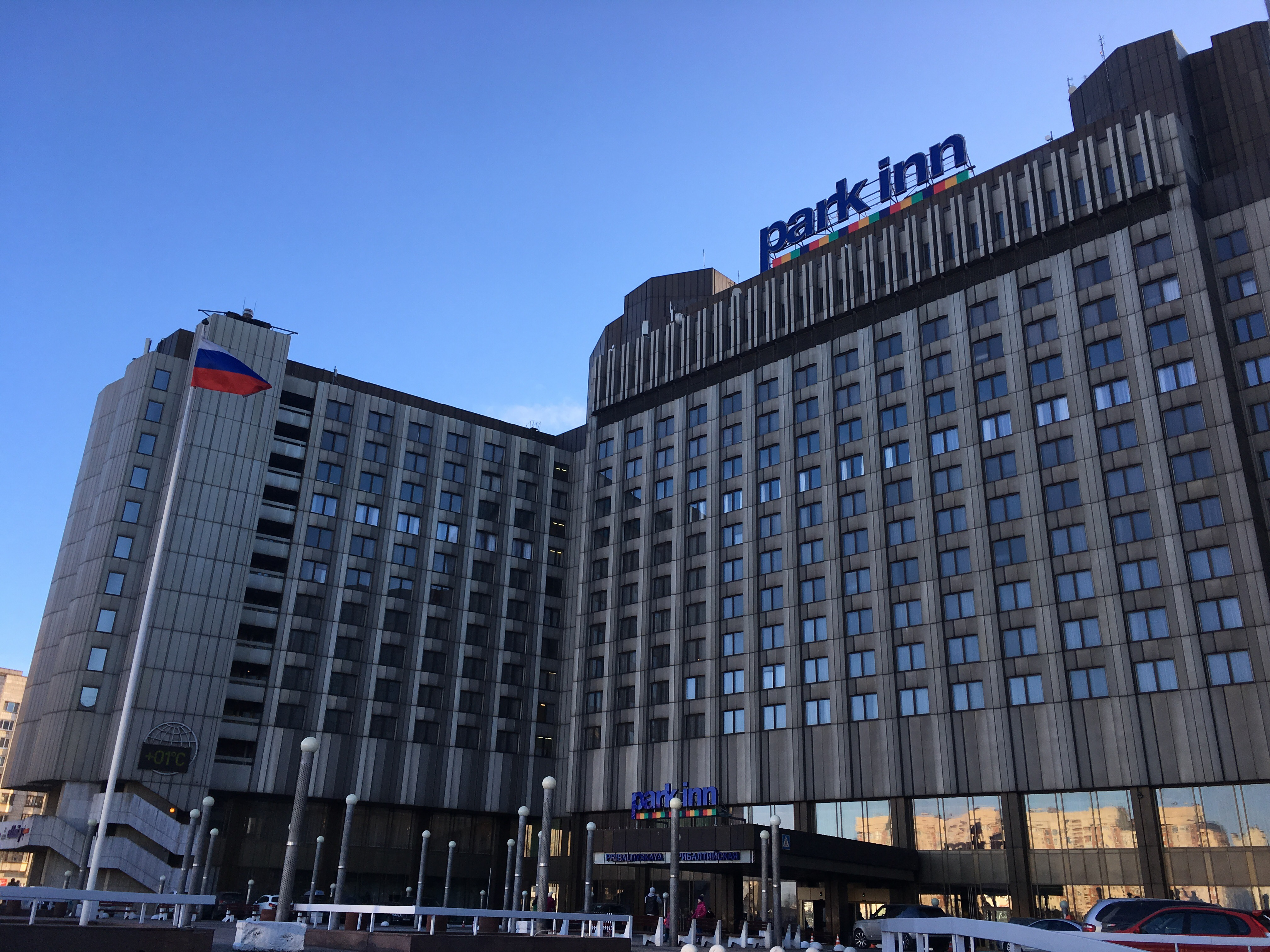 Прибалтийская